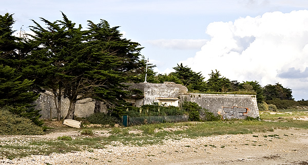 La redoute Vauban du Martray, et le blockaus intégré l'ors de la seconde guerre mondiale - Ars-en-Ré - Île de Ré